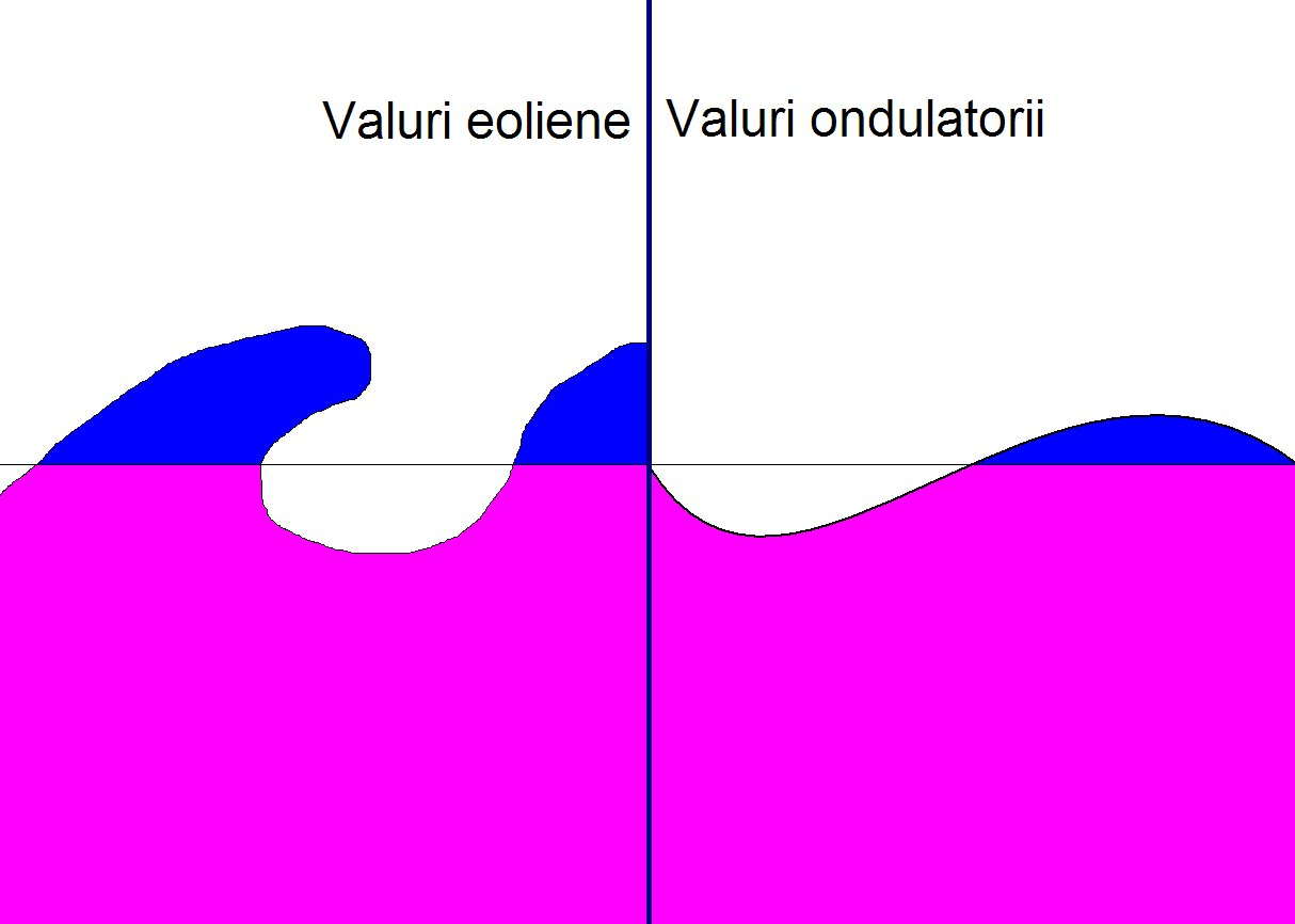 Cele două tipuri principale de valuri: eoliene şi ondulatorii